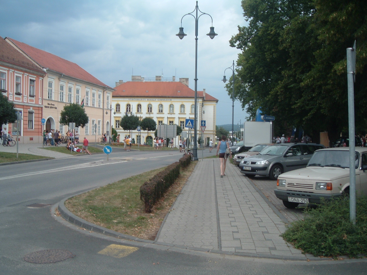 Móra Ferenc Városi Könyvtár és Múzeum ÉS a Vörösmarty Mihály Gimnázium. - Széll Kálmán tér, Szentgotthárd